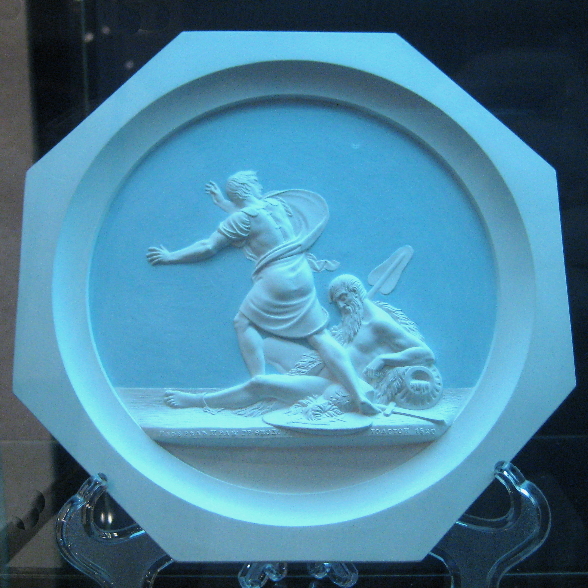 Ф.И. Толстой. "Бегство Наполеона за Неман. 1812".